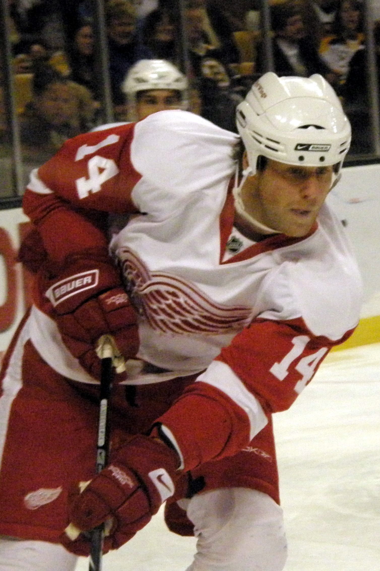 #14 Derek Meech (D)